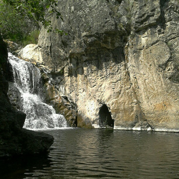 Споменик природе Сутеска Сиколске реке са водопадом на Мокрањској стени